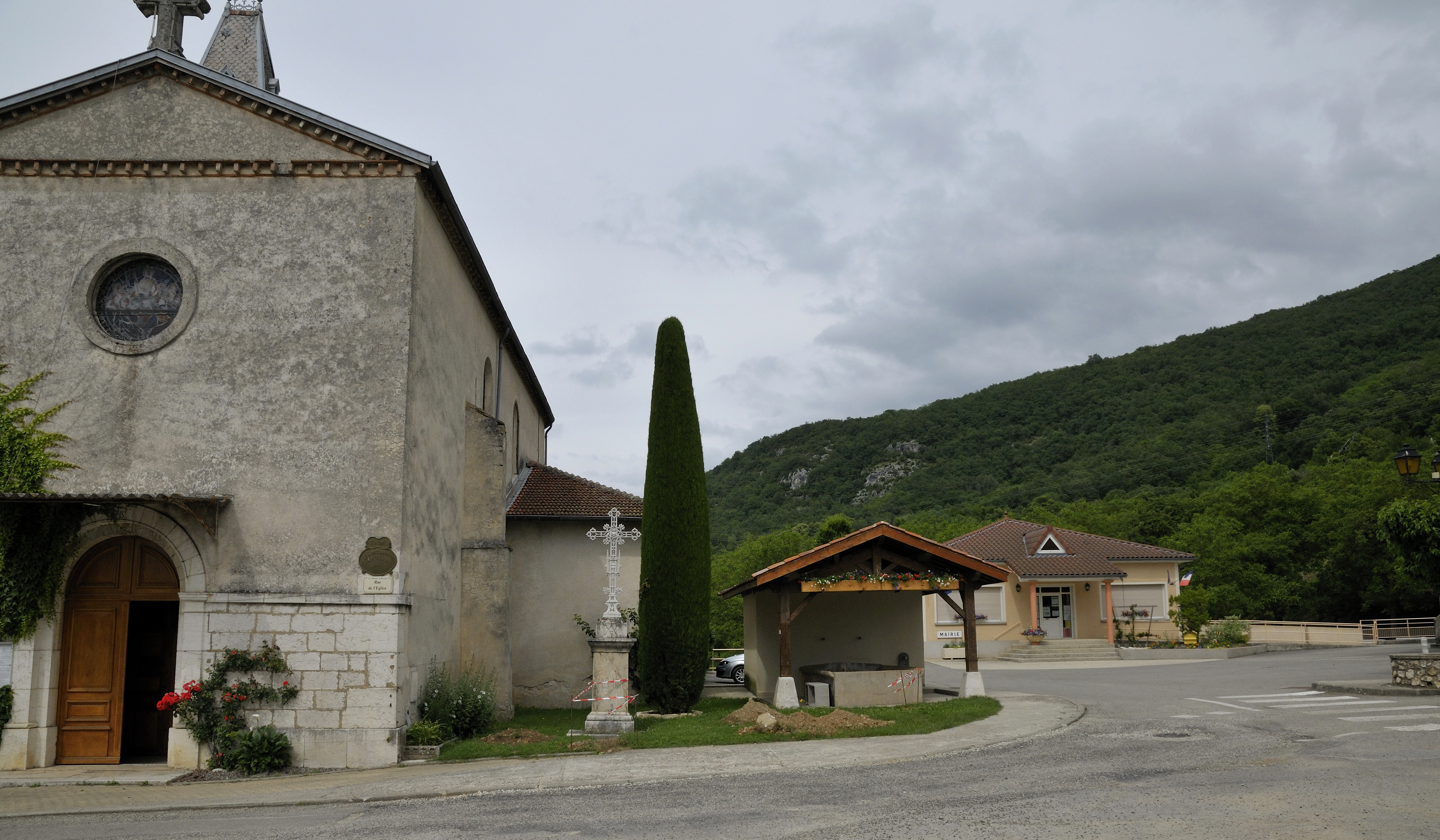 église du XIXe et mairie